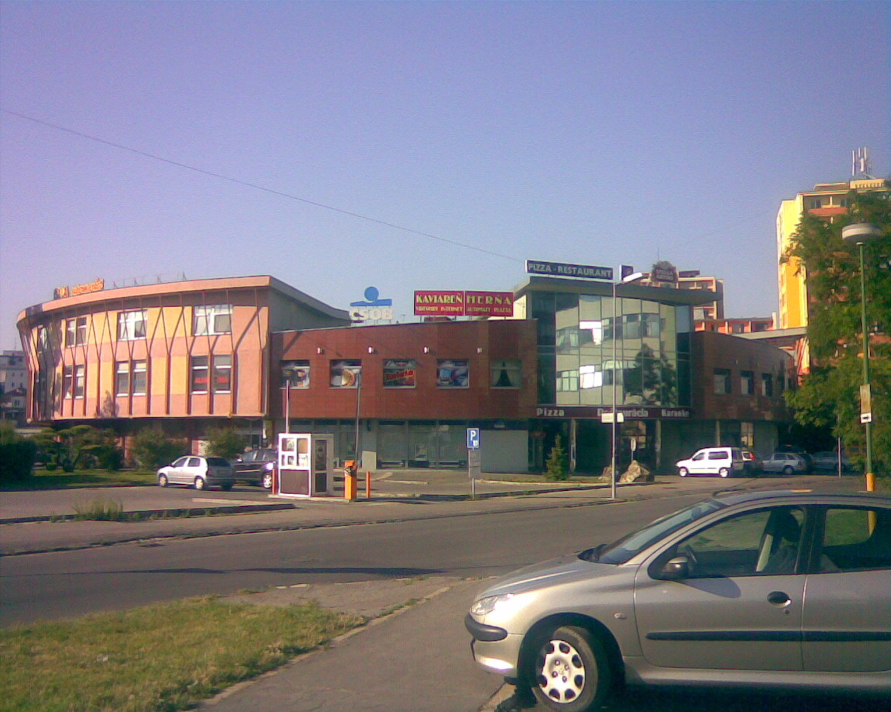 Slimák (obchodný dom)